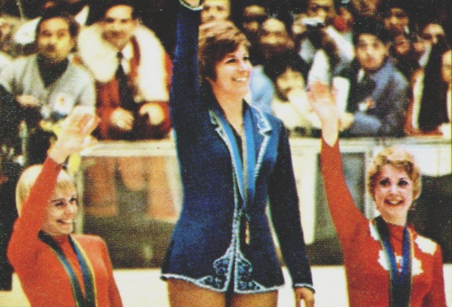 MUNCHEN 72 - Figurina-Stickers - Panini - N° 269 - LYNN-SCHUBA -PATTINAGGIO-Rec